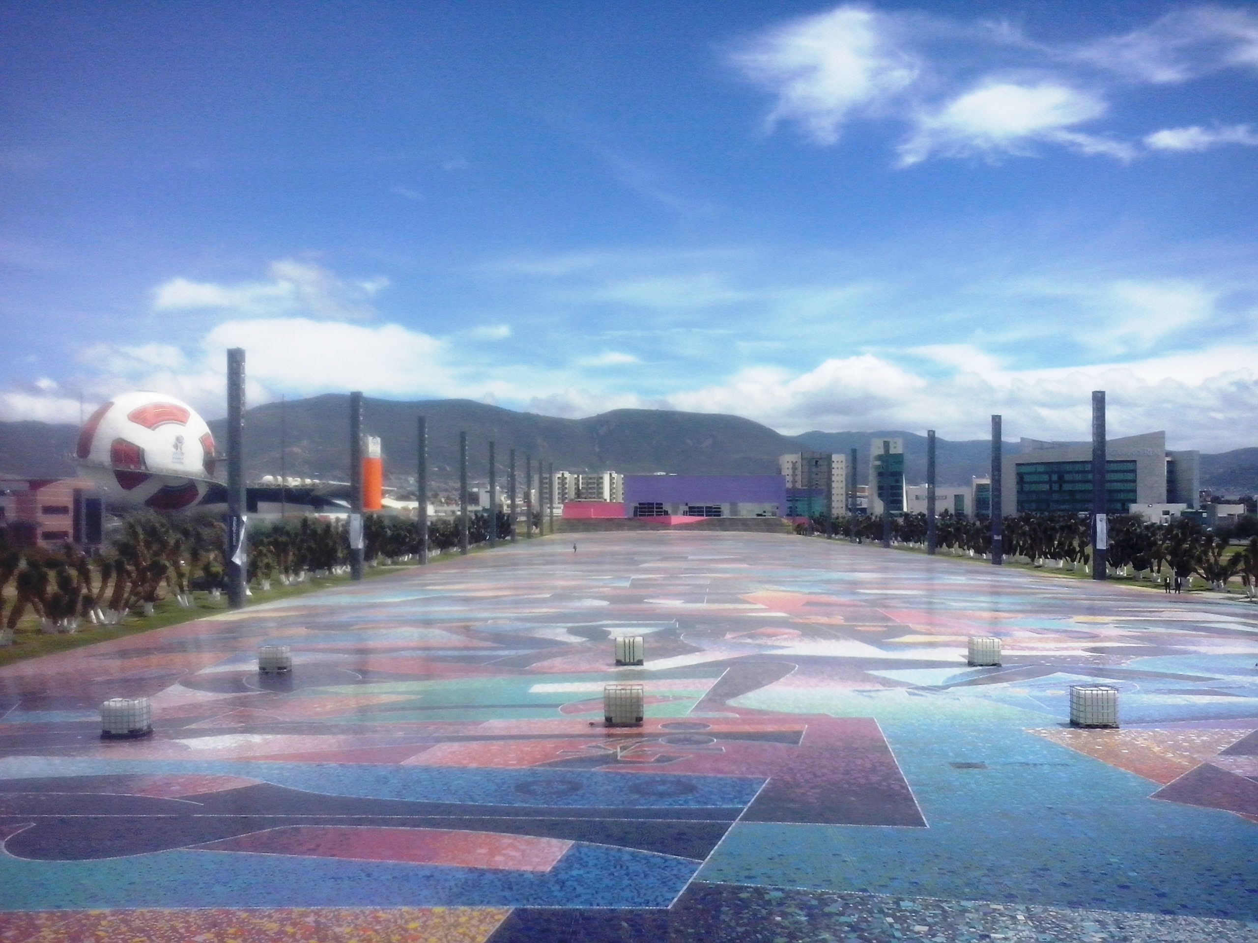 Mosaico Homenaje a la Mujer del Mundo en el Parque David Ben Gurión en la ciudad de Pachuca de Soto, México.